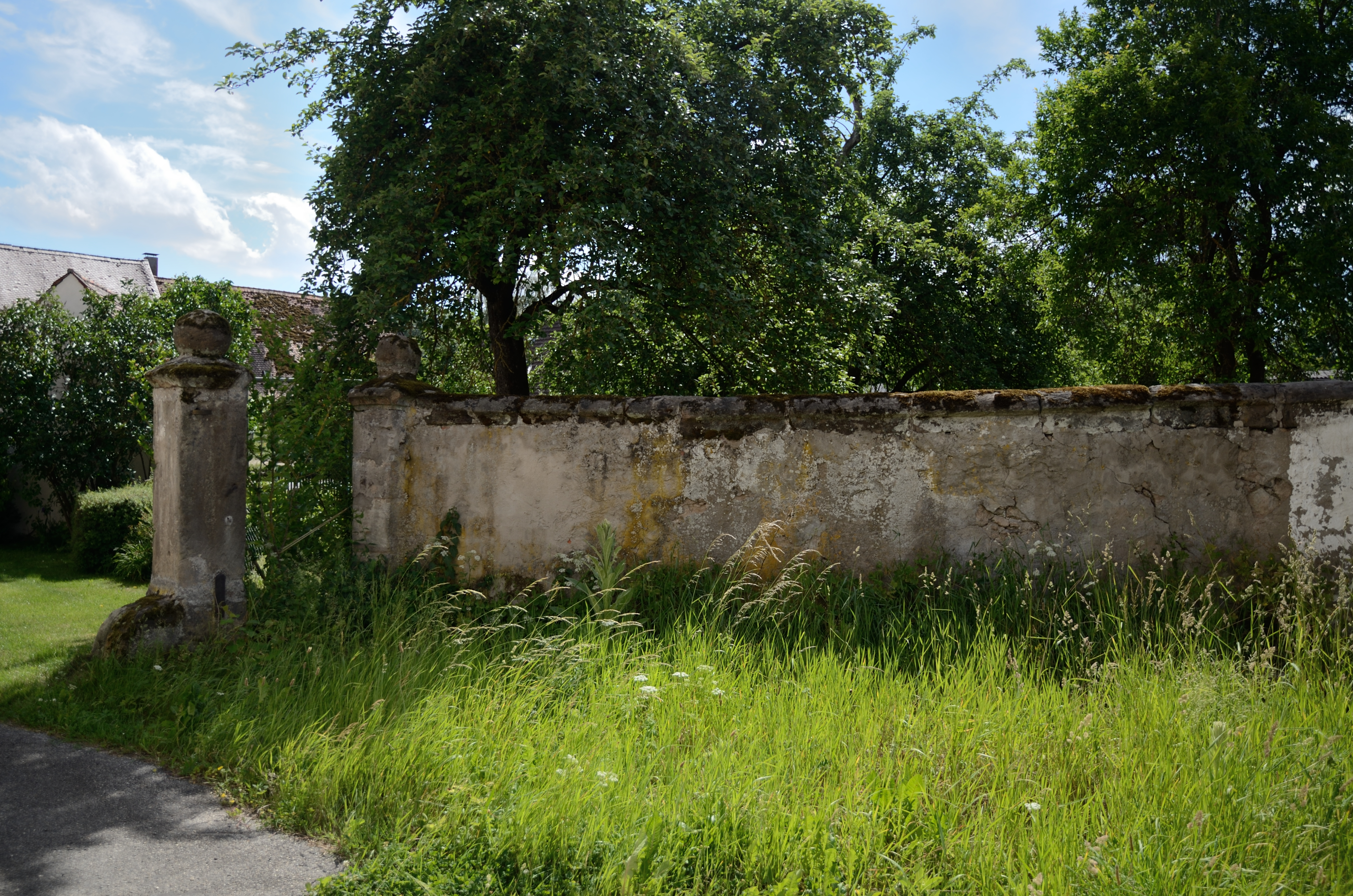 Steinbach, Silberbachstraße 11: Einfriedung. Bruchsteinmauer mit zwei Torpfeilern mit Kugelaufsätzen, 18. Jahrhundert.